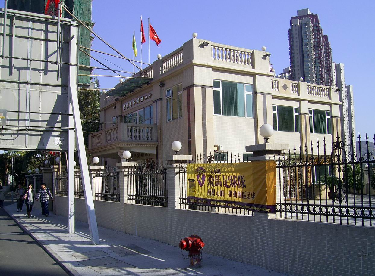 中文（香港）: 元朗十八鄉事委員會